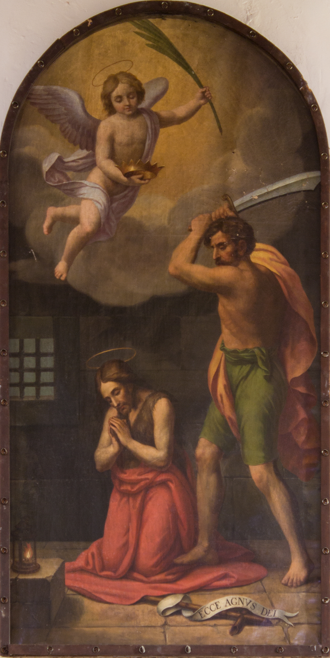 Lubriano, chiesa di San Giovanni Battista Decollato: interno, pala d'altare che rappresenta la decapitazione del Battista.